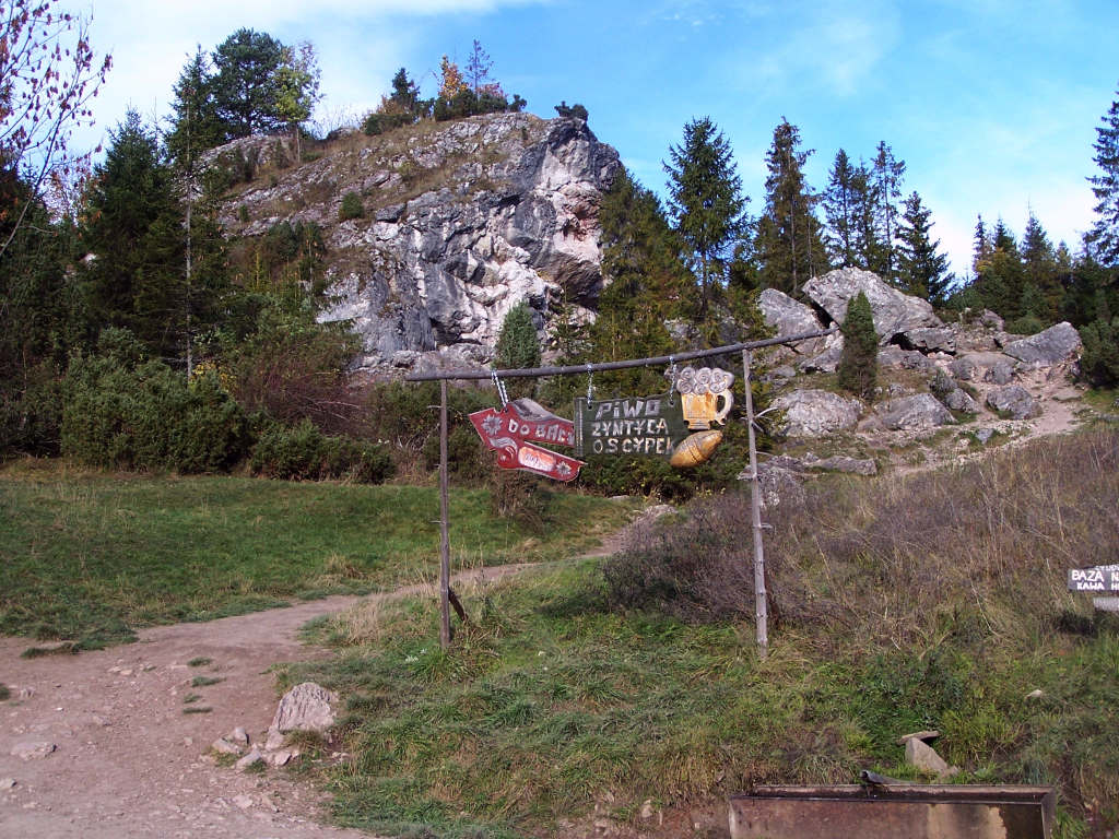 Jemetriskowa Skałka (Małe Pieniny)